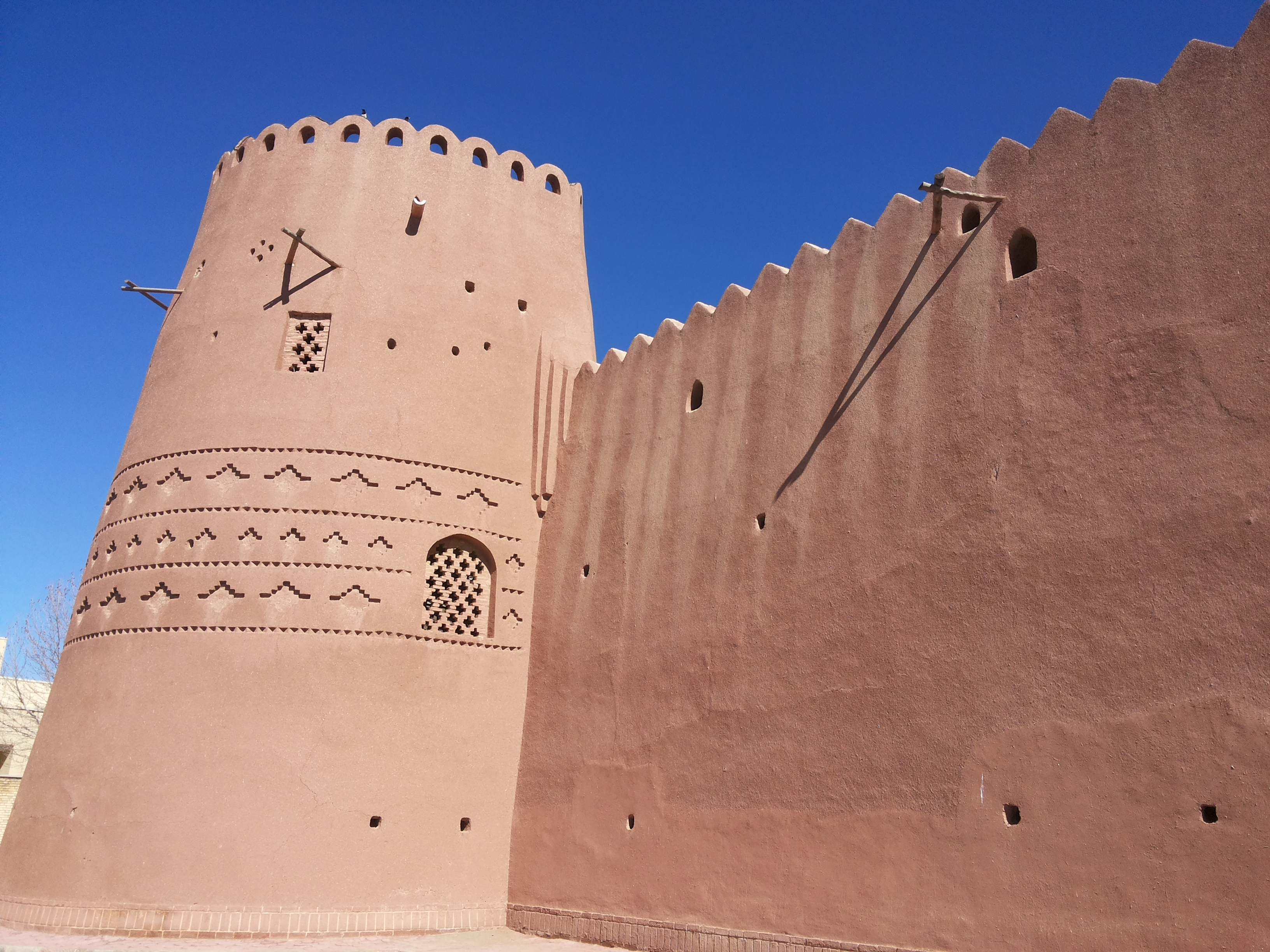 برج گوگد گلپایگان- نمای بیرون -روز